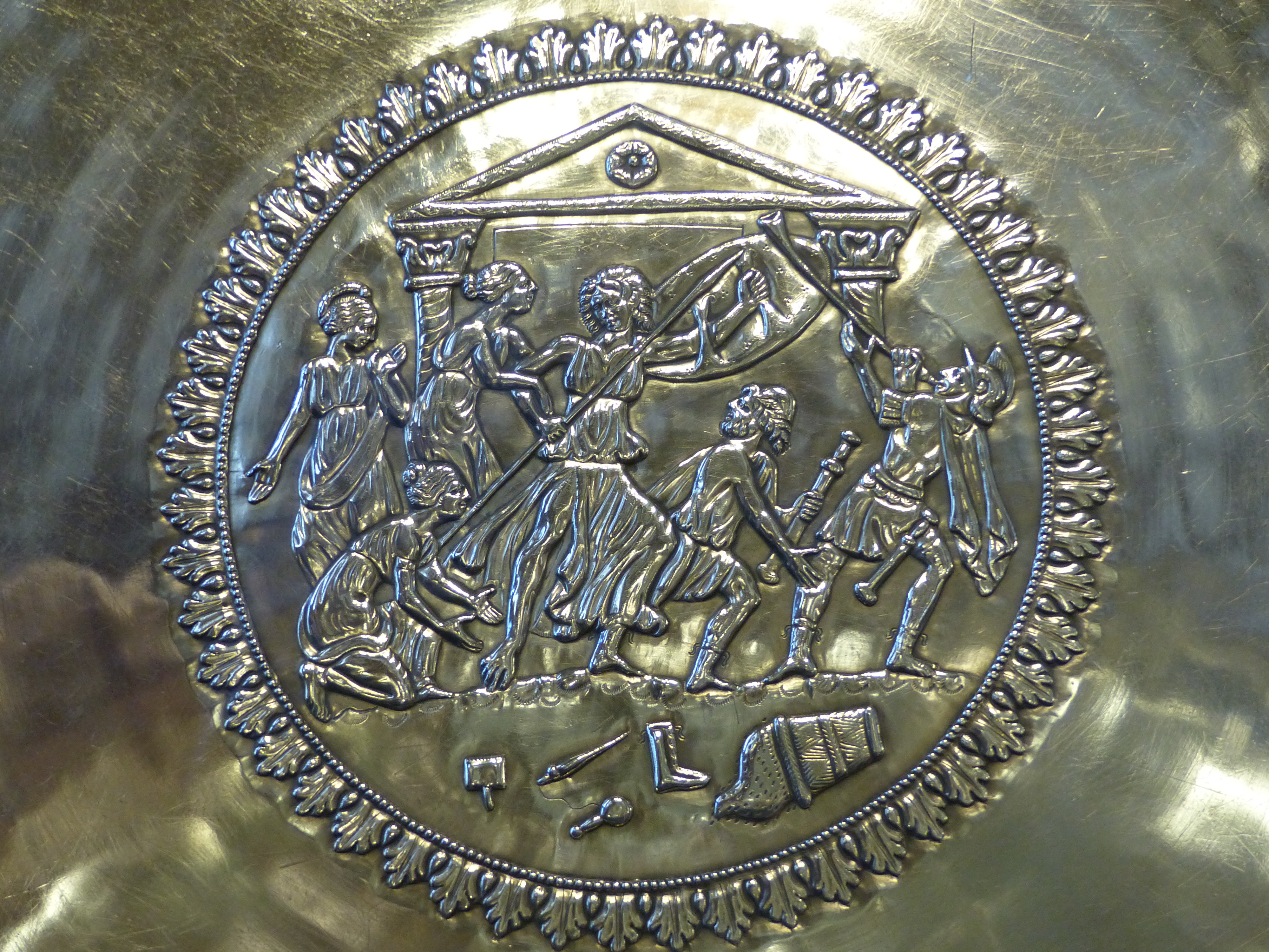 Akhilleusz tál. A Seuso kincs legnagyobb méretű darabja. 72 cm átmérőjű és 11,8 kb tömegű. Akhilleusz életéből vett jelenetek díszítik. Tálalásra és valószínűleg dísztálként is használták. Egyetlen vastag, öntött ezüstlapból készítették. A peremét gyöngysorral keretelték. A medalion felett Pallasz Athéné és Poszeidon Athén feletti versengése, két oldalán dionüszoszi menet.